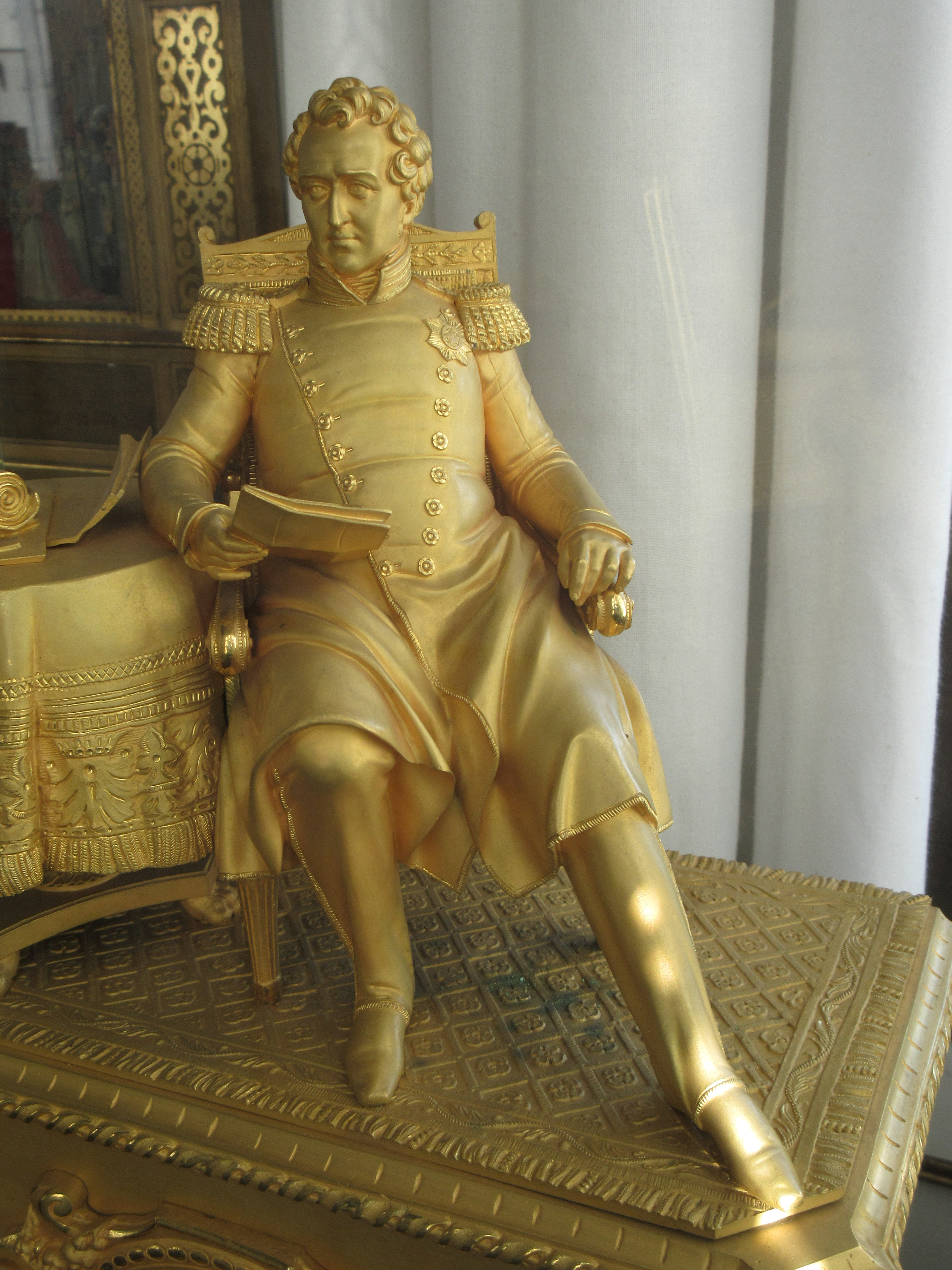 Udsnit af forgyldt statuettefigur forestillende en siddende kong Christian 8. af Danmark - nok fremstillet i 1840'erne. Kunstnernavn ikke oplyst. Befinder sig på Rosenborg Slot i København.